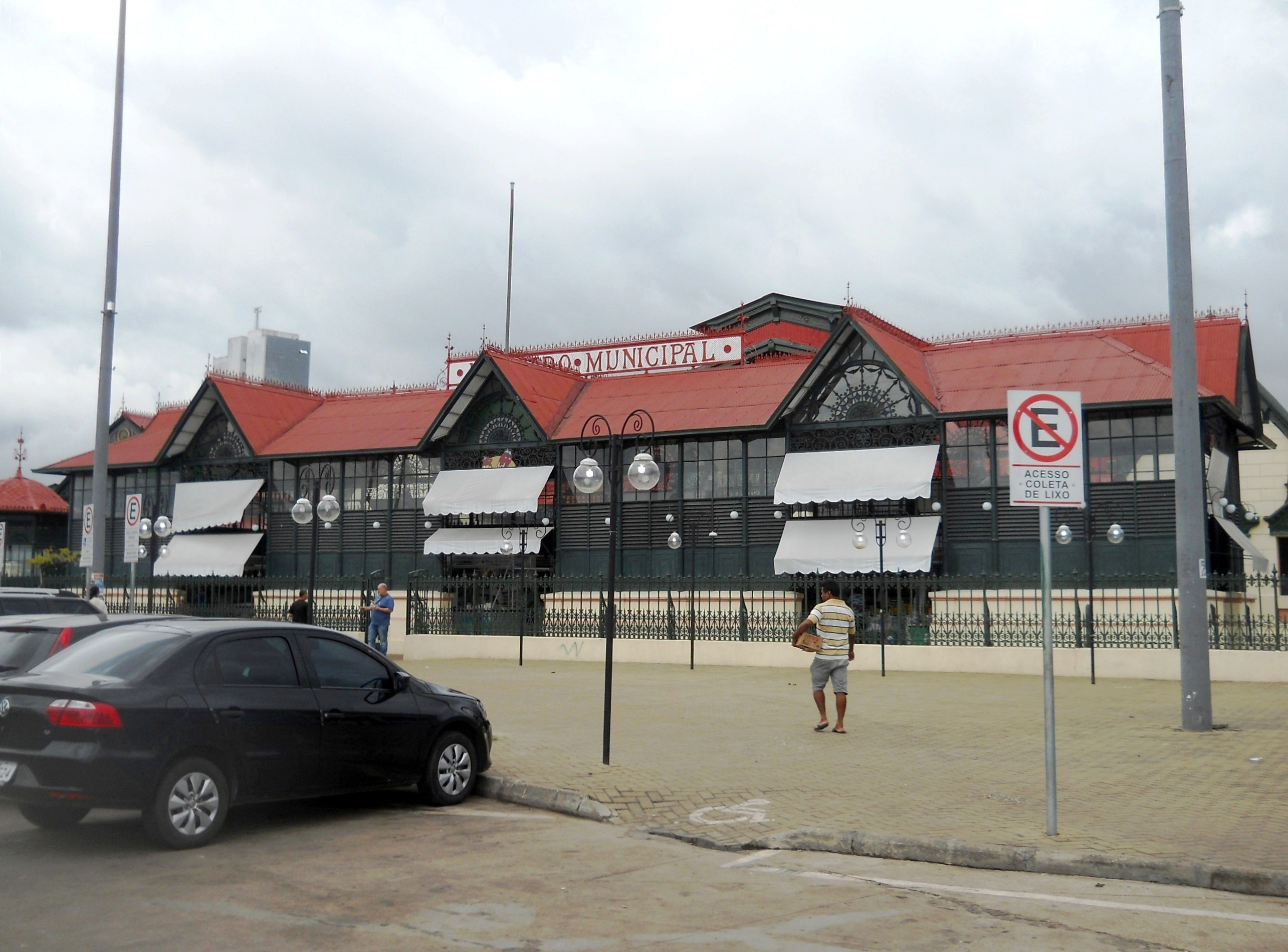 Imóvel denominado Mercado Adolfo Lisboa ou Mercado Municipal, compreendendo seus pavilhões e jardins, embarcadouro e trecho correspondente da margem do rio